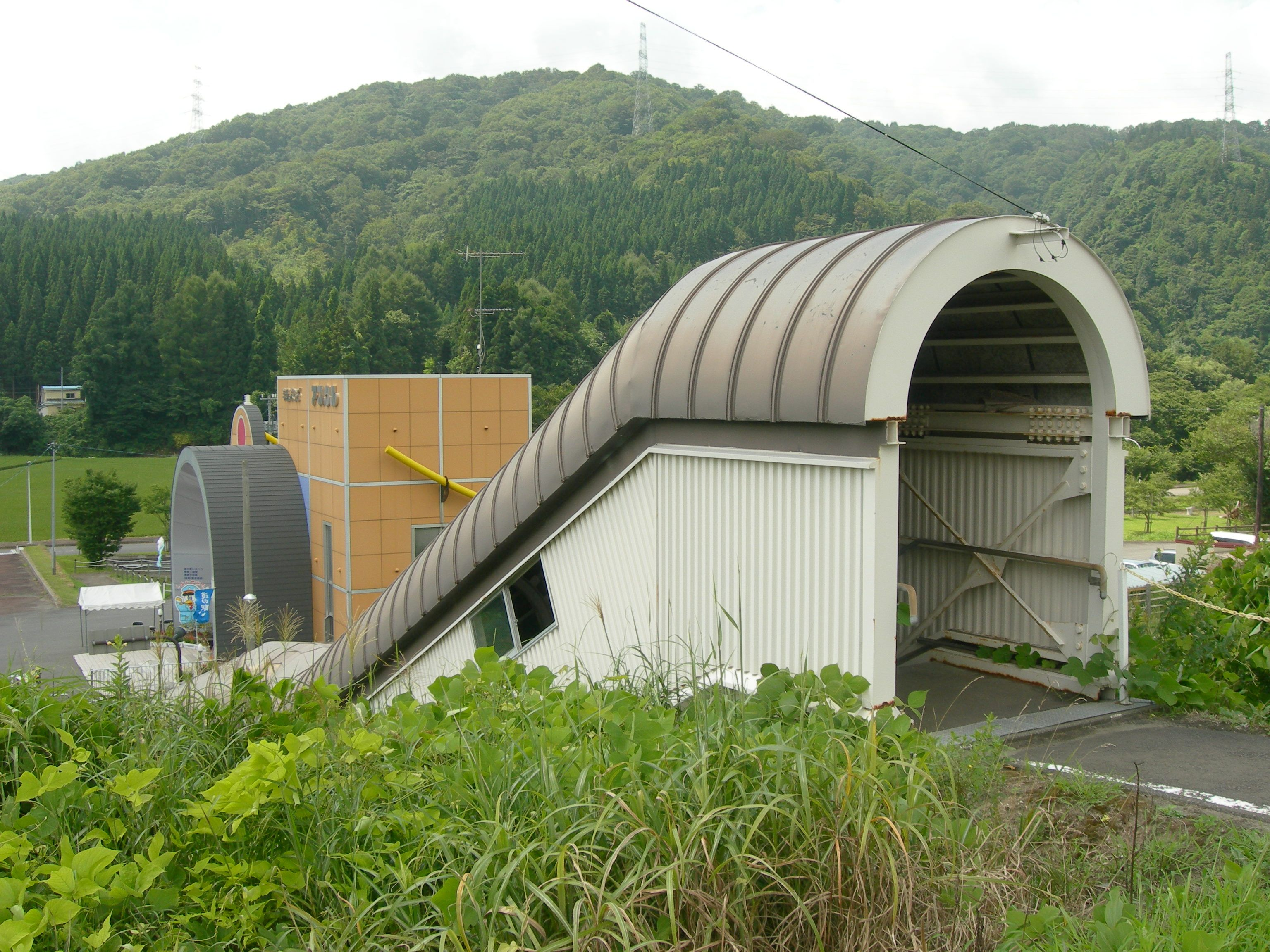 津軽今別駅から外に出るための階段